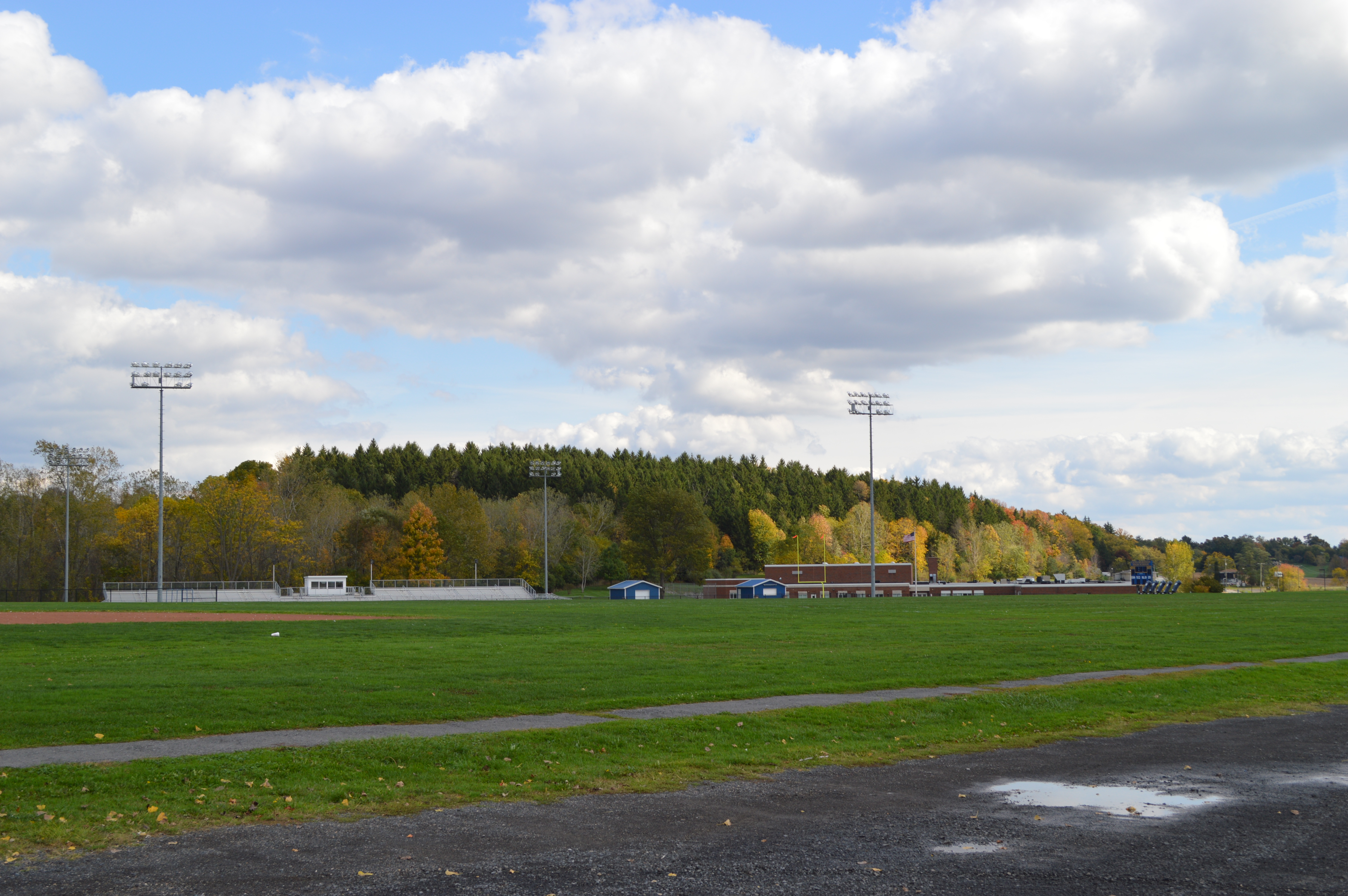 Ira, NY, USA